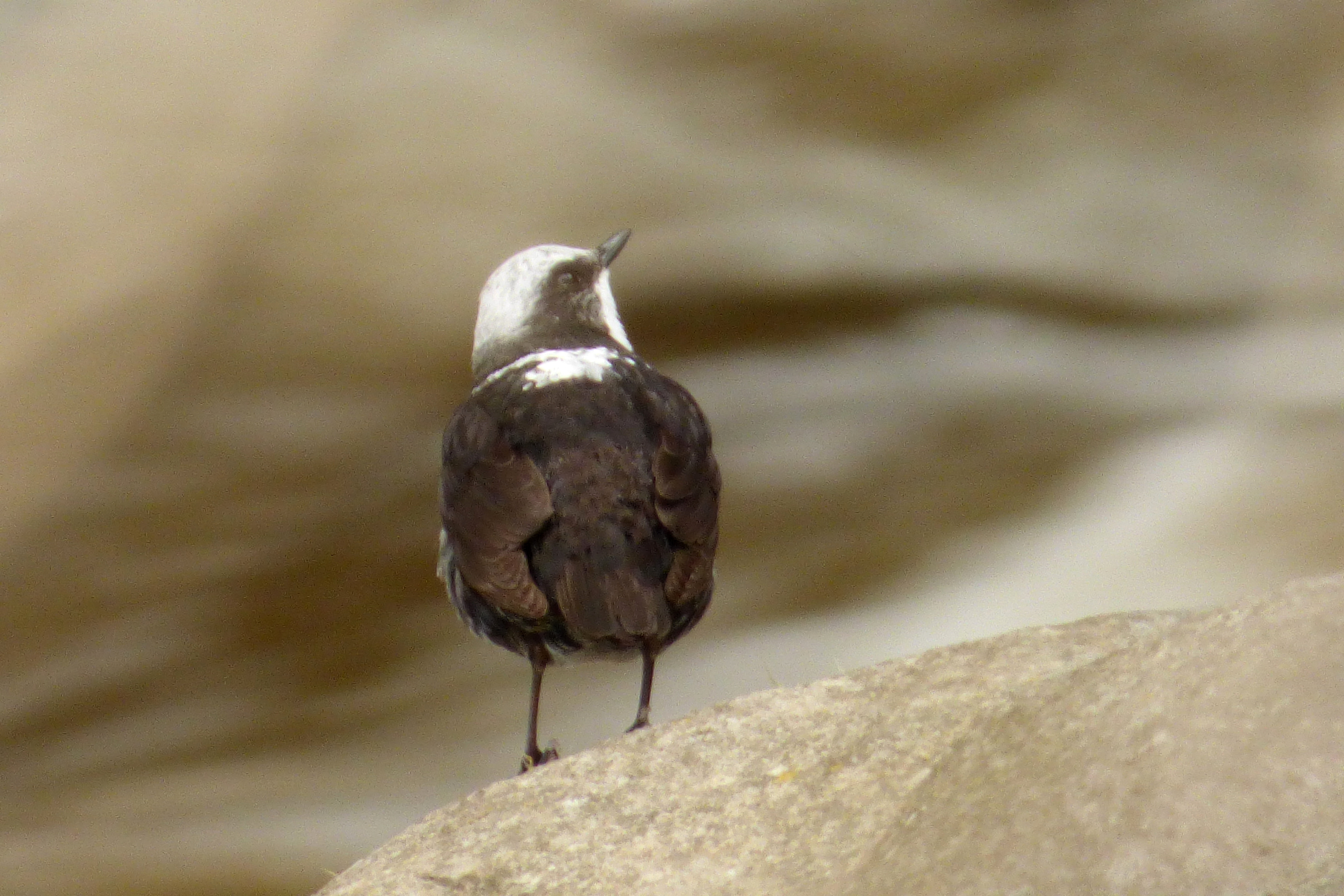 Cinclus lecocephalus (Mirlo acuático)